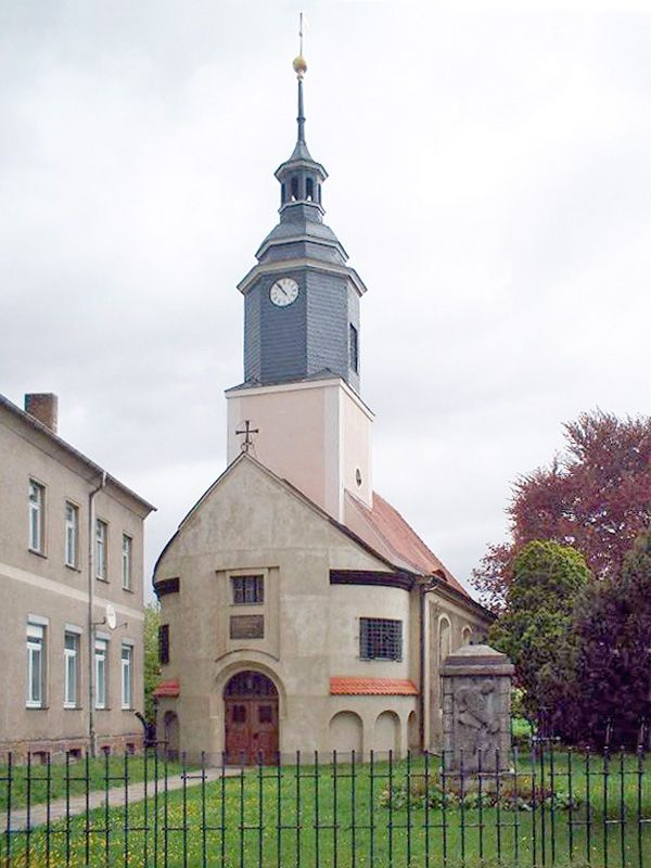 Frontansicht der Katharinenkirche zu Großdeuben, davor das Denkmal der Gefallenen der beiden Weltkriege und die alte Schule